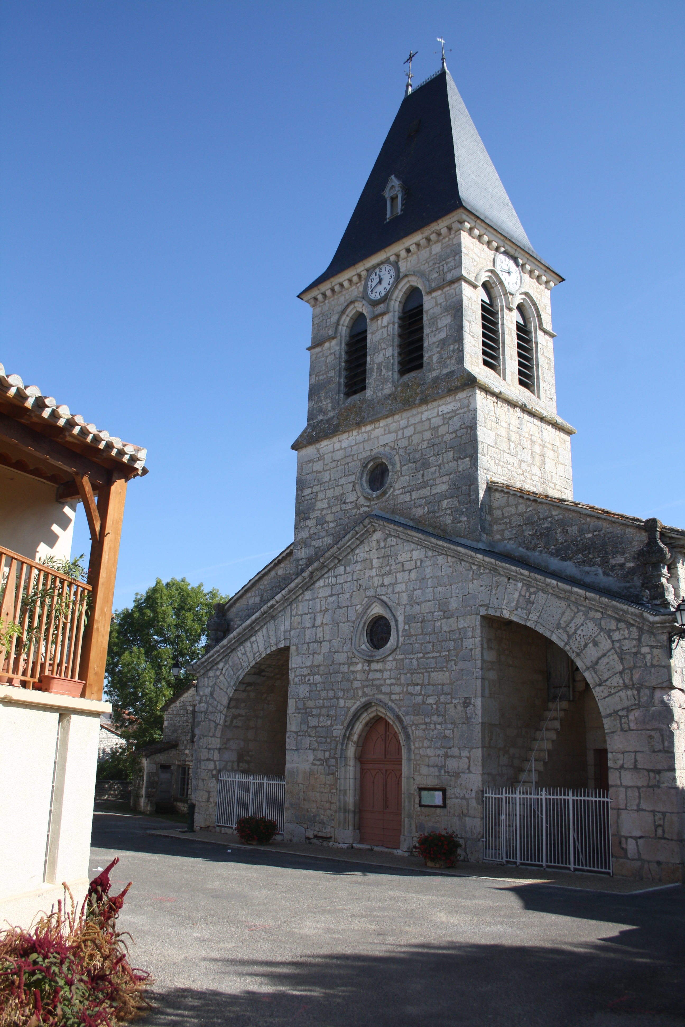 Eglise Saint Clair de Fontanes, Lot (France).